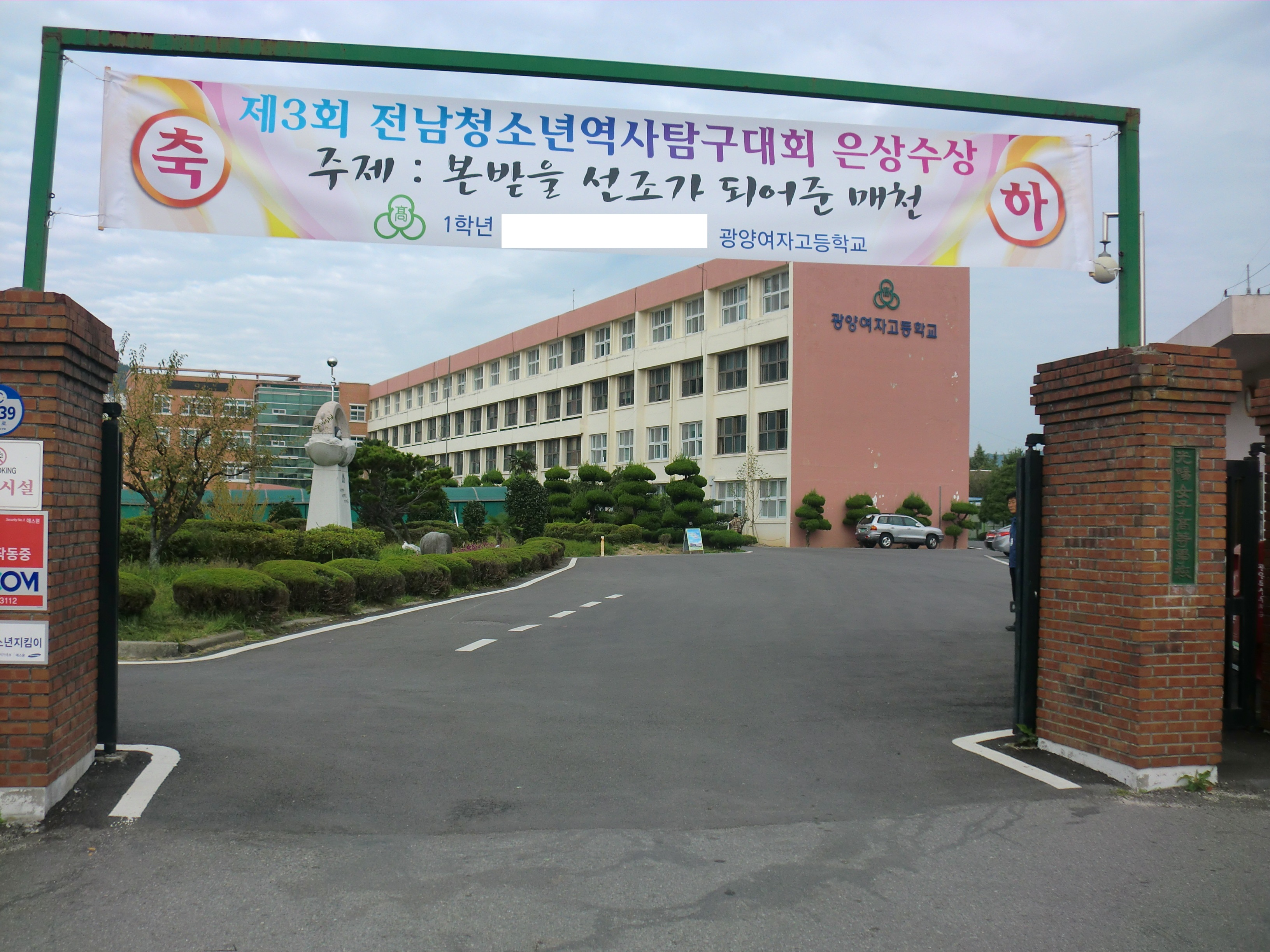 전라남도 광양시에 있는 광양여자고등학교